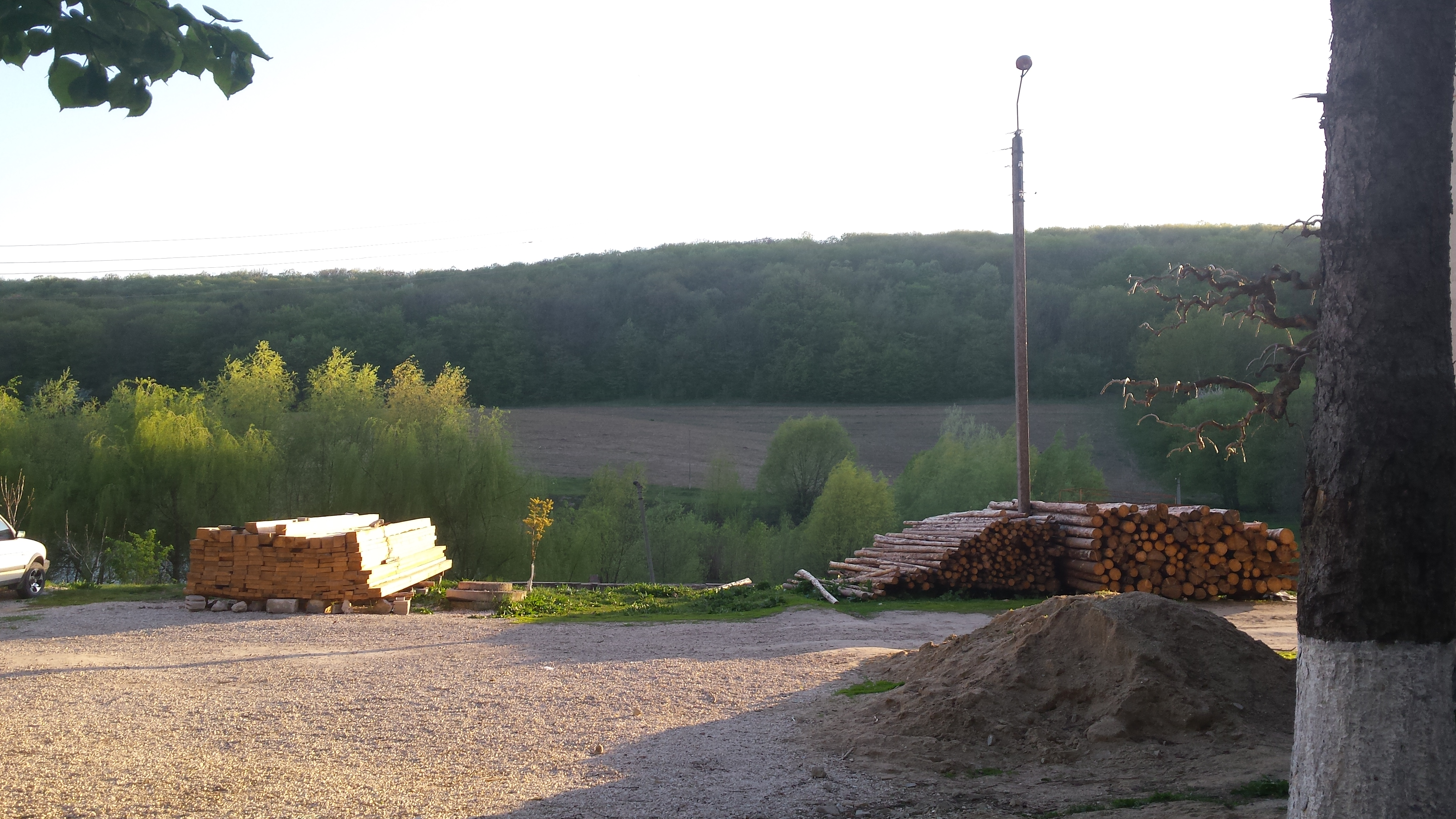 Pădure adiacentă mănăstirii Țigănești (raionul Strășeni, Rep. Moldova)